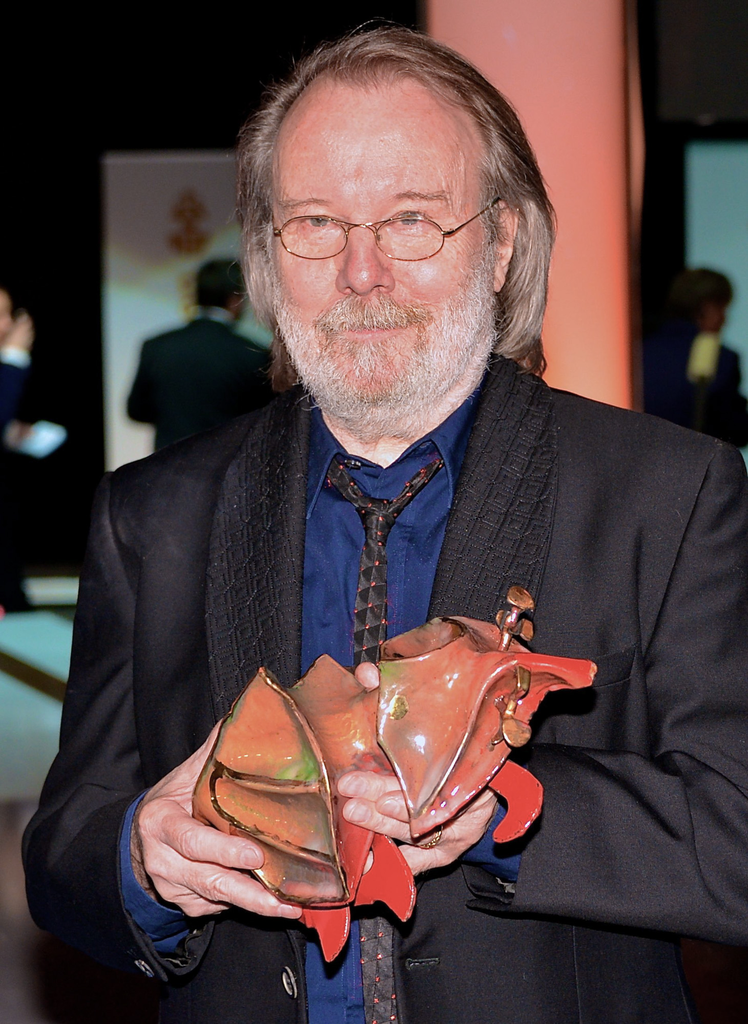 Benny Andersson får guldbagge på Guldbaggegalan den 21 januari 2013.